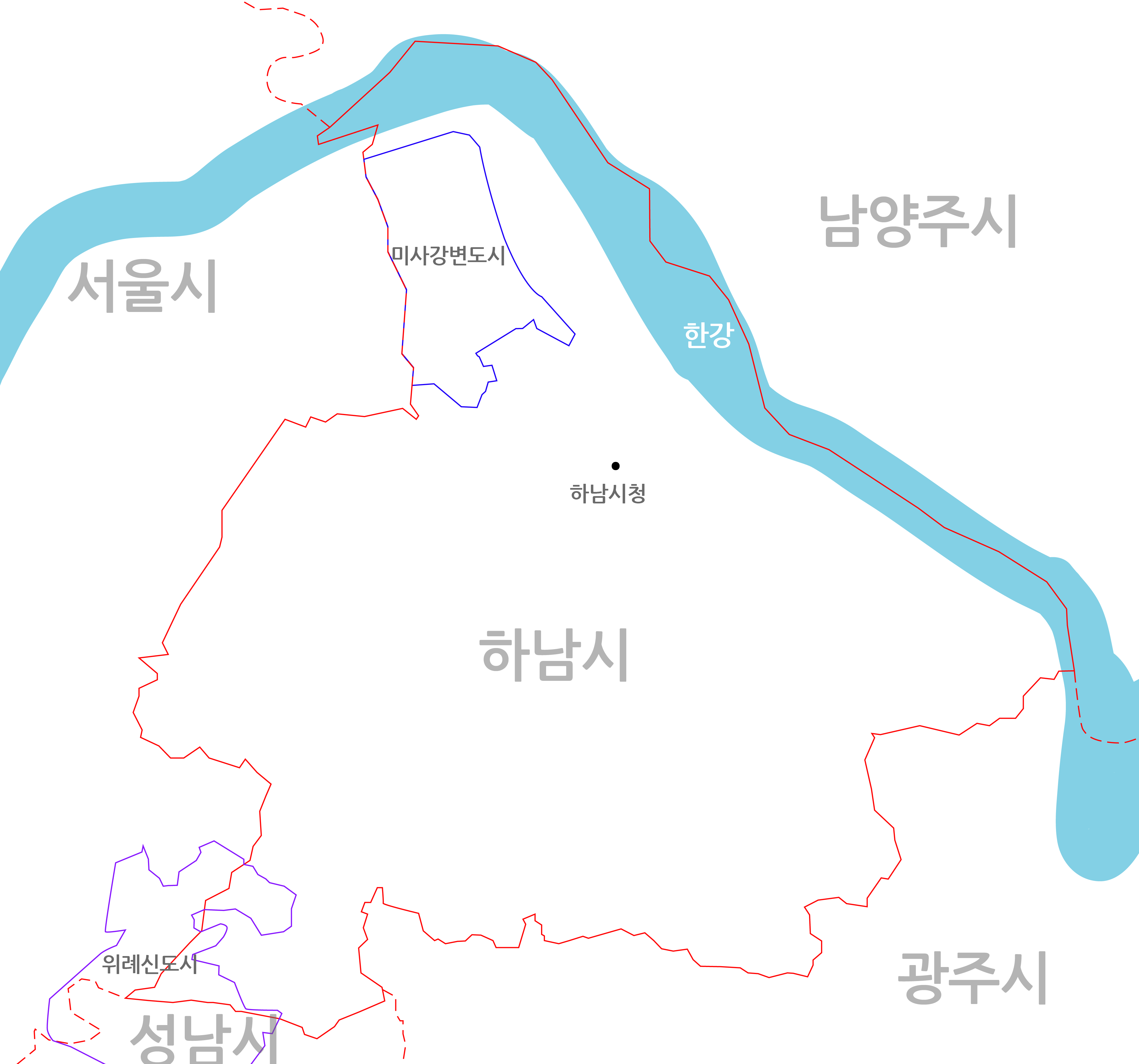 하남시와 계획도시